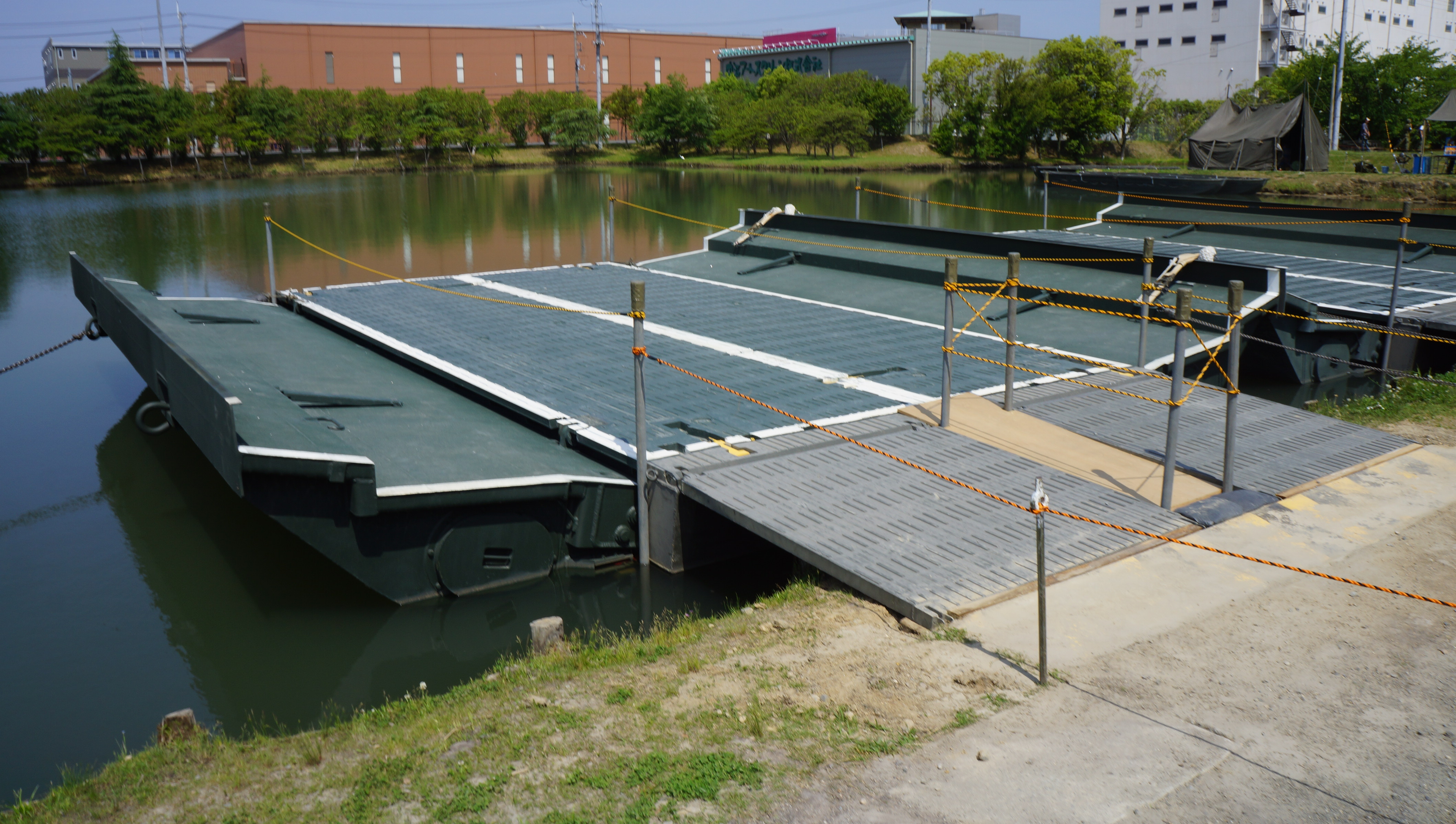 92式浮橋（橋端橋節、展開状態）。 13年5月26日 陸上自衛隊大久保駐屯地にて。